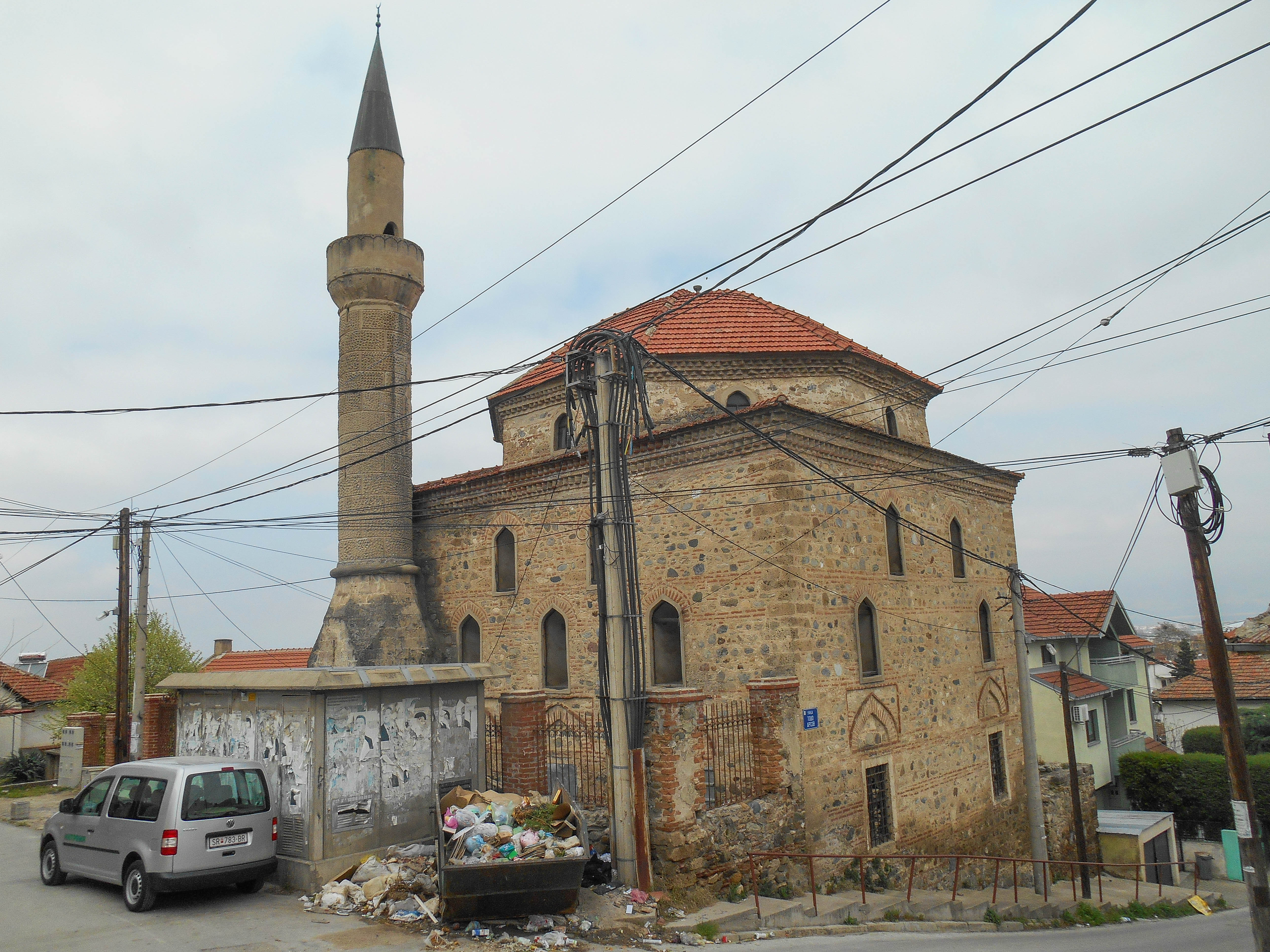 Орта џамија